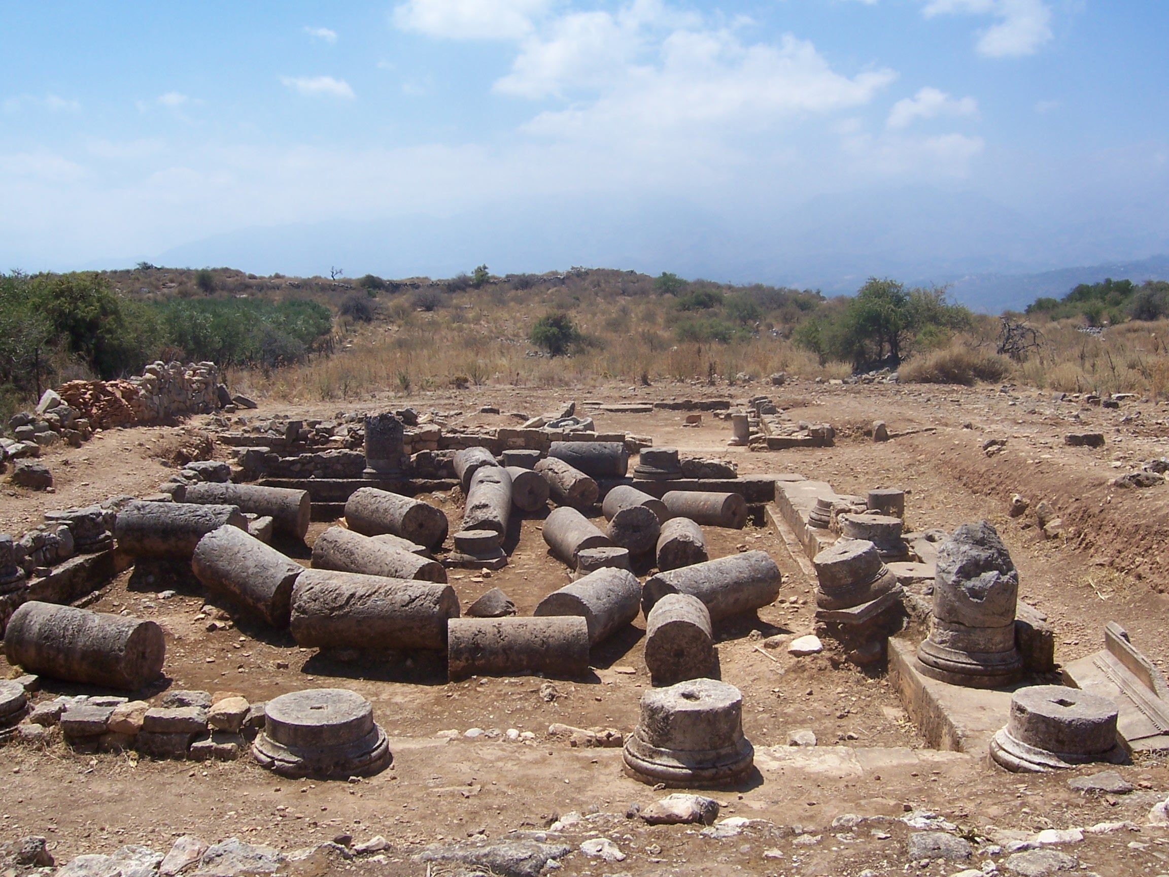 Villa romaine avec peristyle (Aptera, Crète)